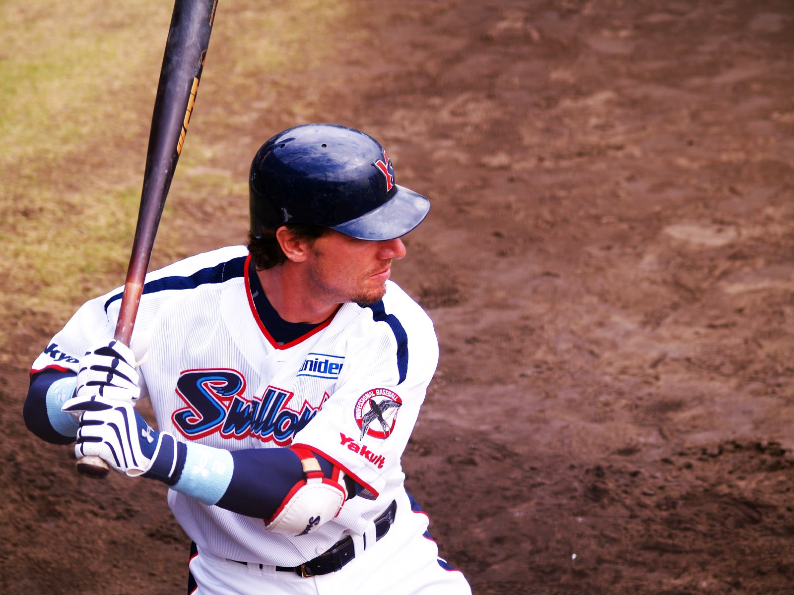 @Japan.Okinawa